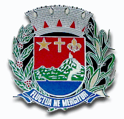 Brasão da Cidade de Carmo do Rio Claro